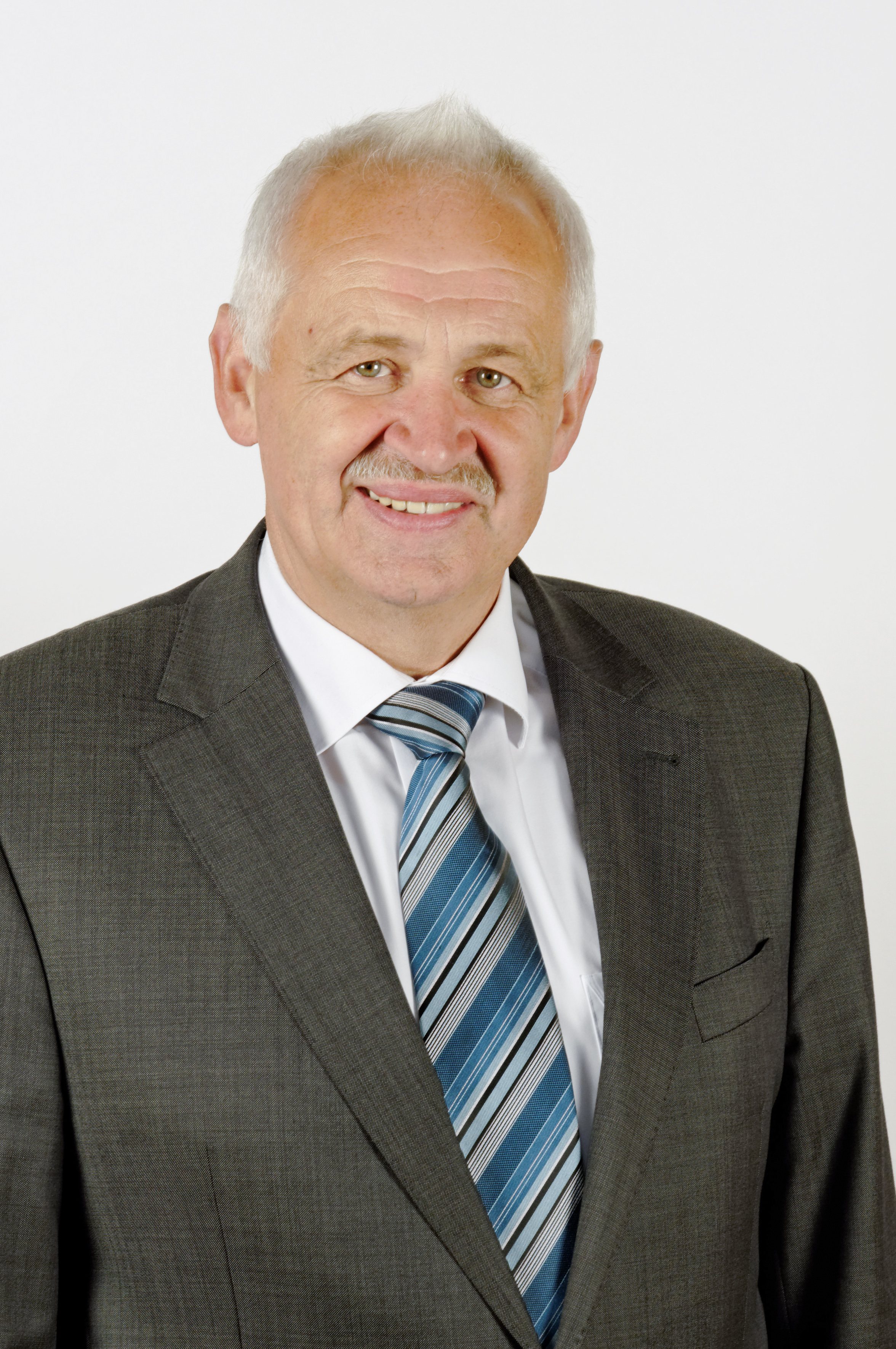 Landtagsprojekt Bayern